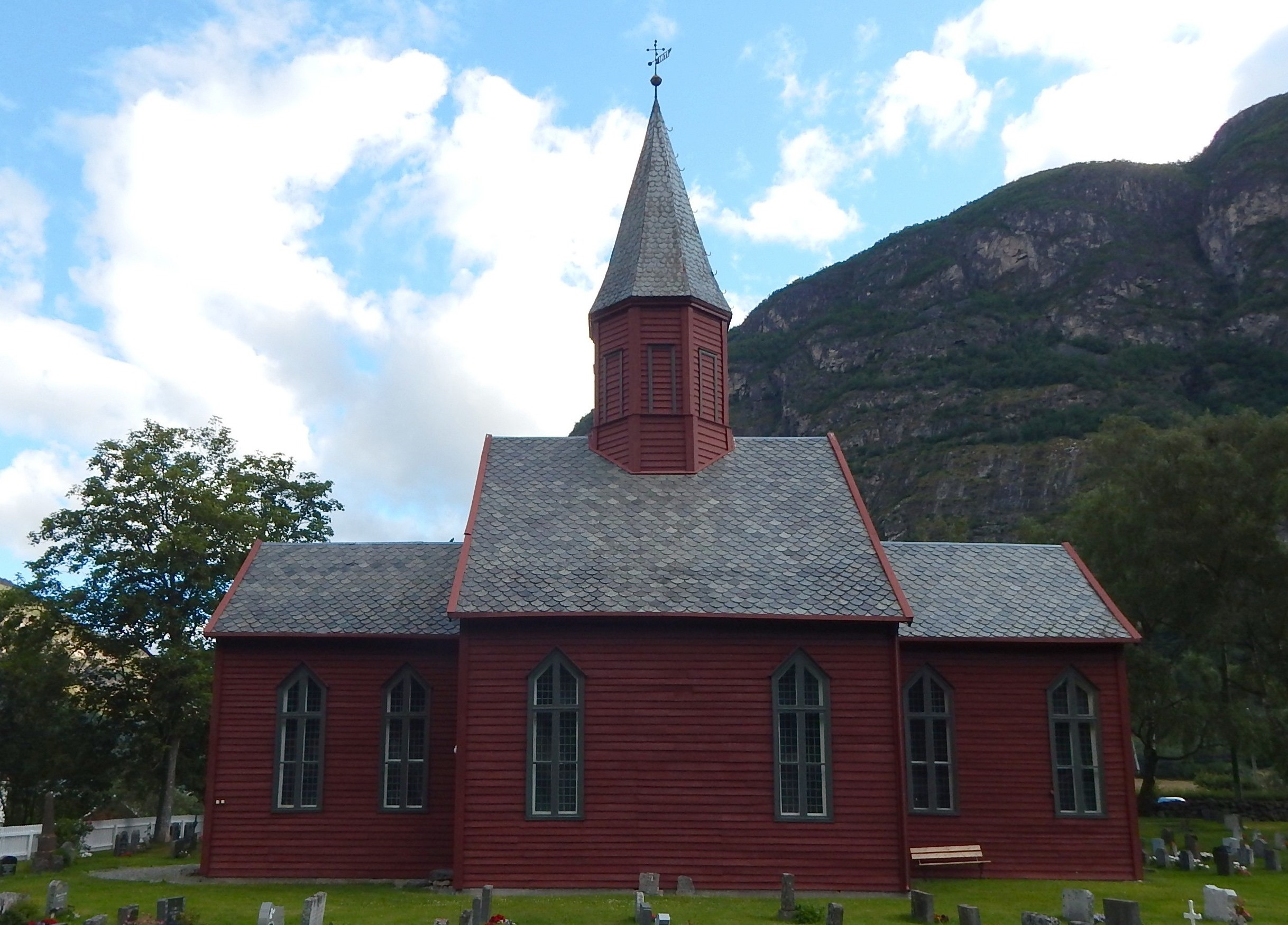 Tønjum kirke i Lærdal